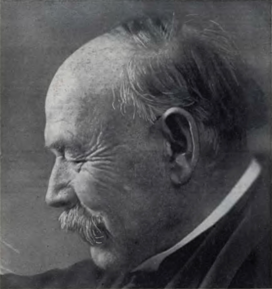 Der deutsche Dichter Paul Barsch (1860–1931) aus Oberschlesien, fotografiert durch Max Glauer.